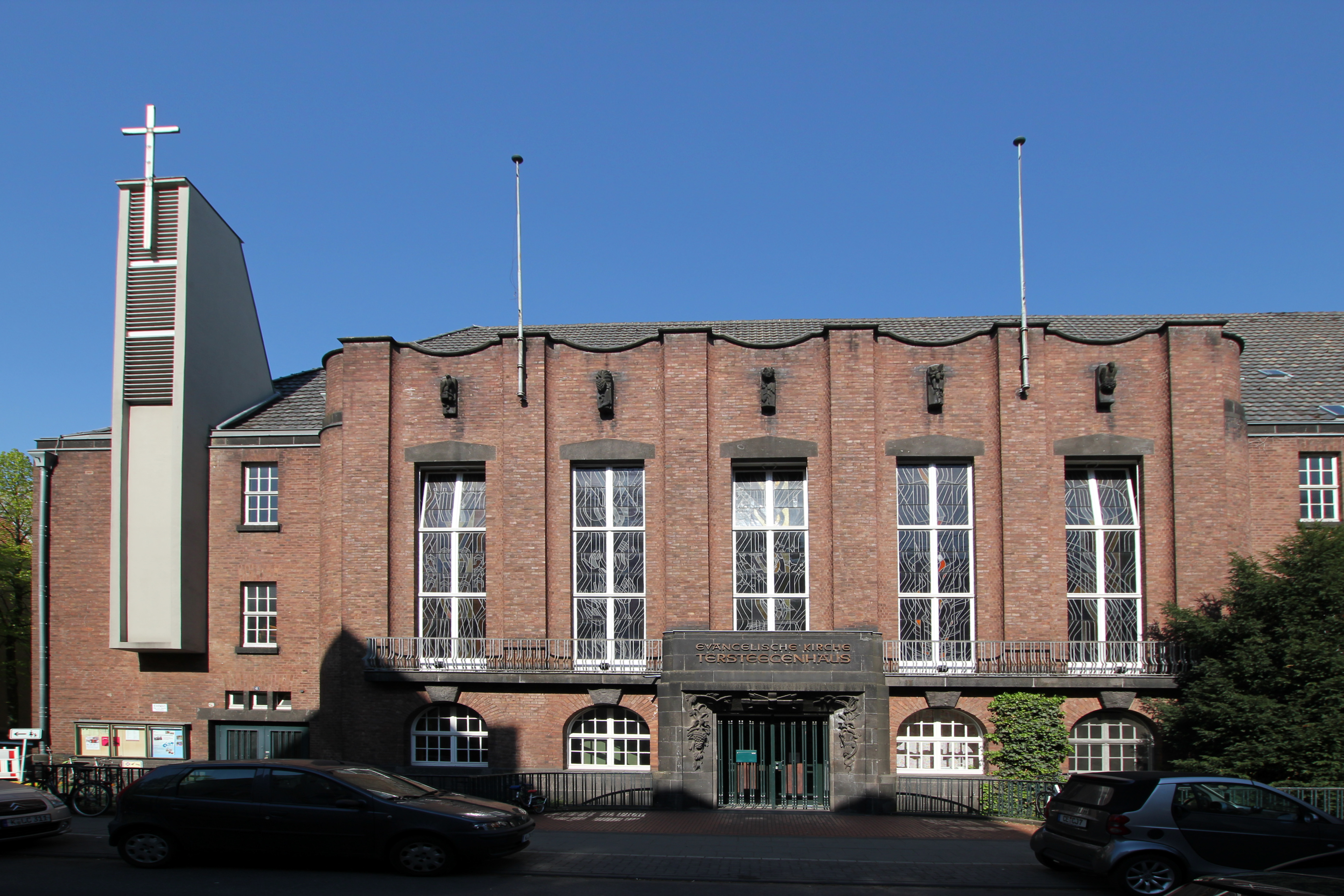 Köln-Sülz, Wittekindstraße 12. Ev. Kirche und Tersteegenhaus